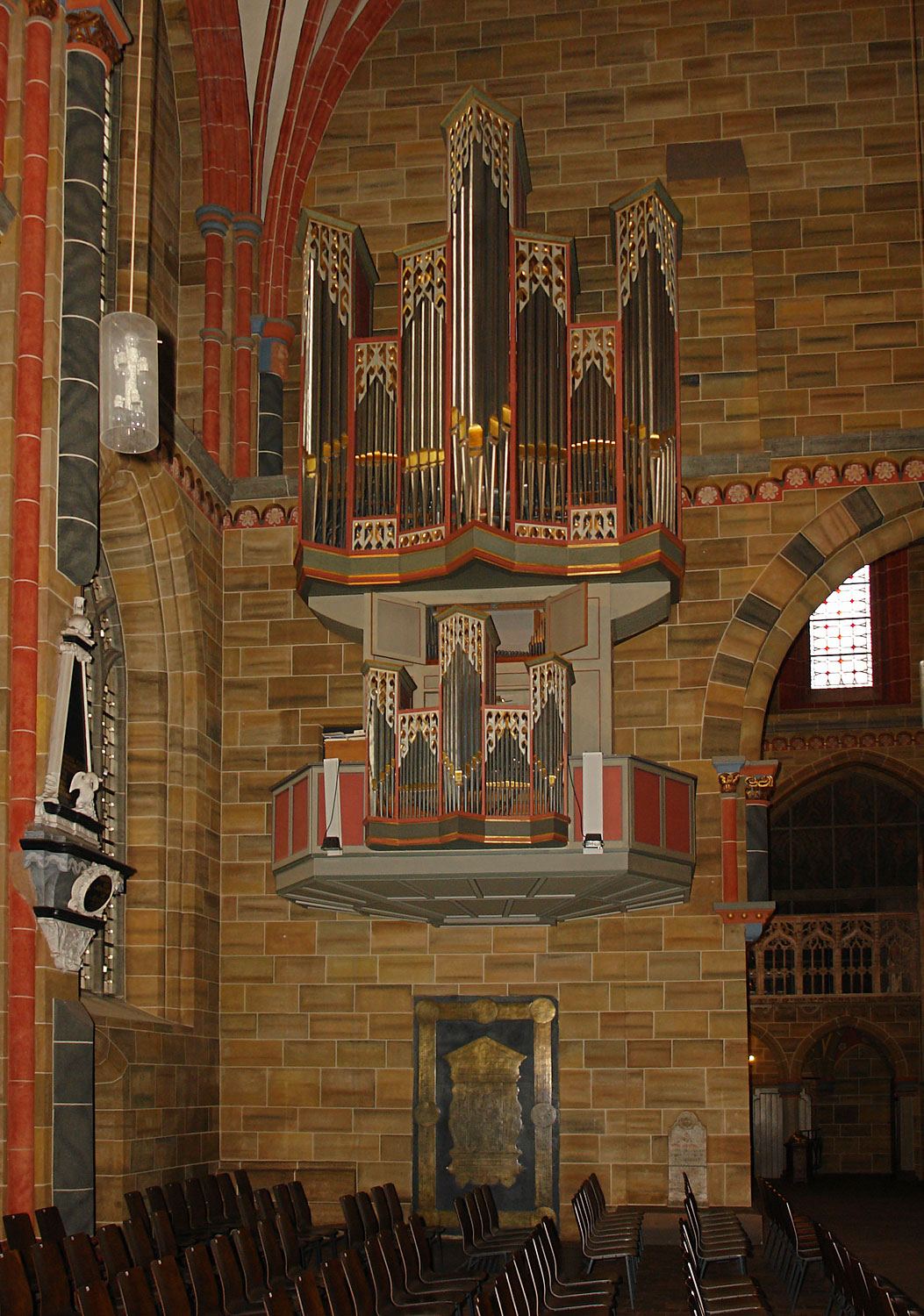 Bremer Dom: Dreimanualige Bach-Orgel (Van Vulpen) im Nordschiff